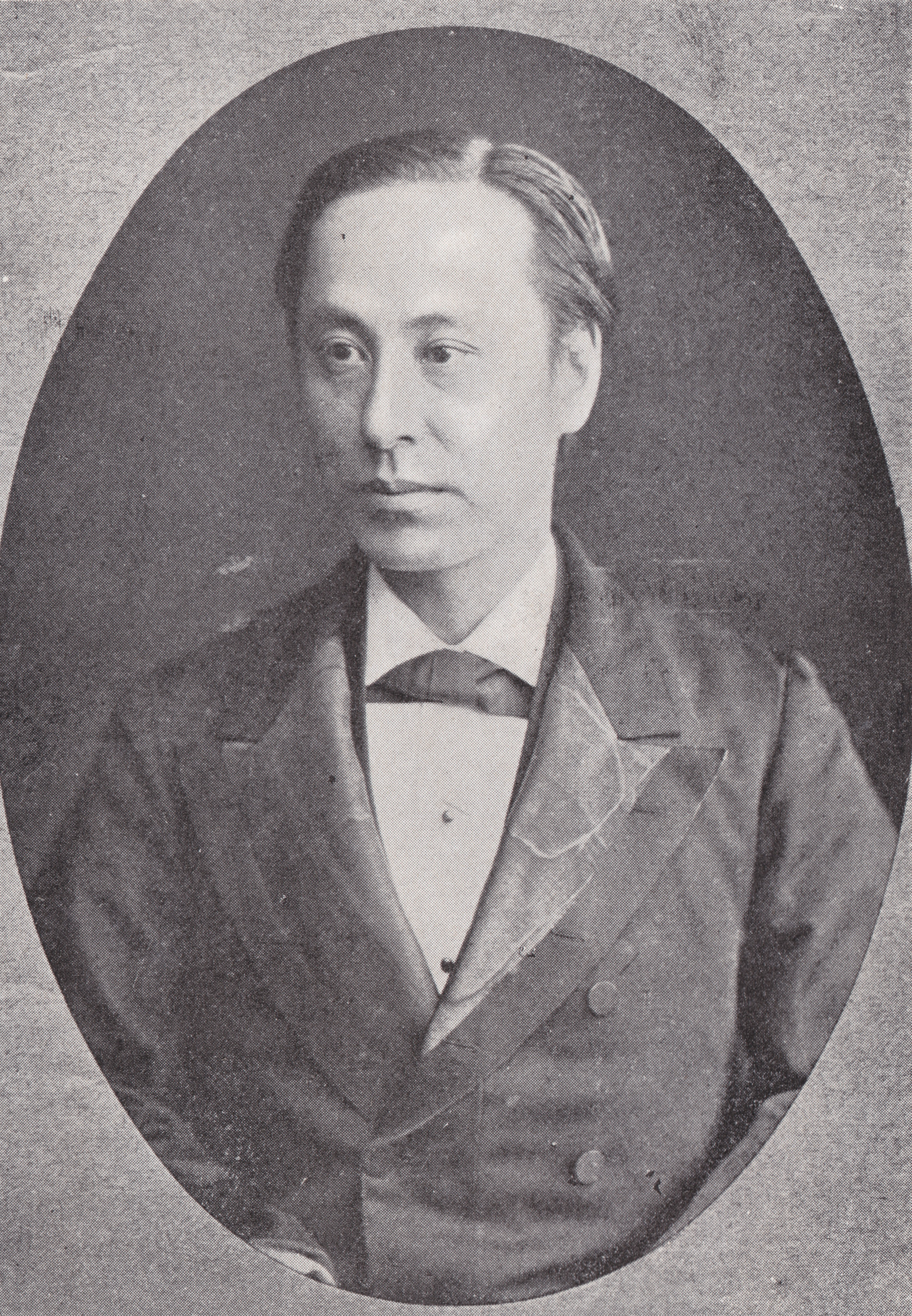 大礼使参与官・掌典長岩倉具綱